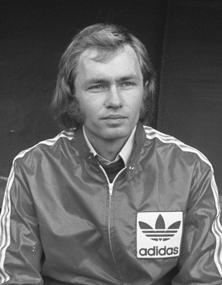 Trainer Leen Looijen op de tribune